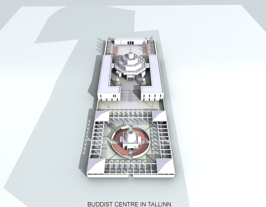 Vilen Künnapu: Buddhist Centre in Tallinn. Project 2005.